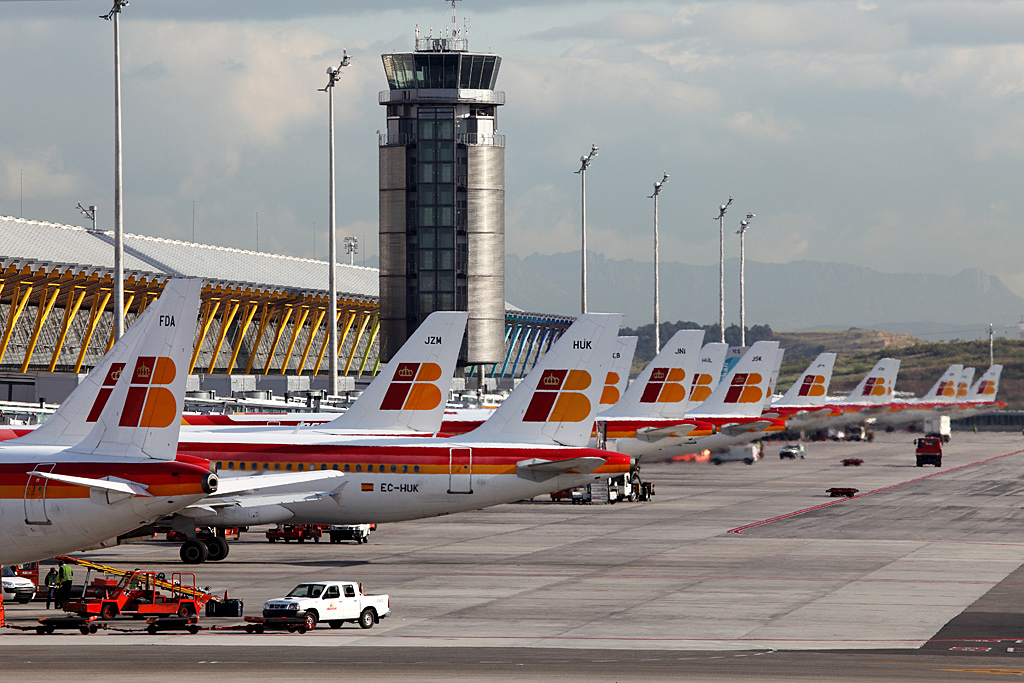 Tower Madrid